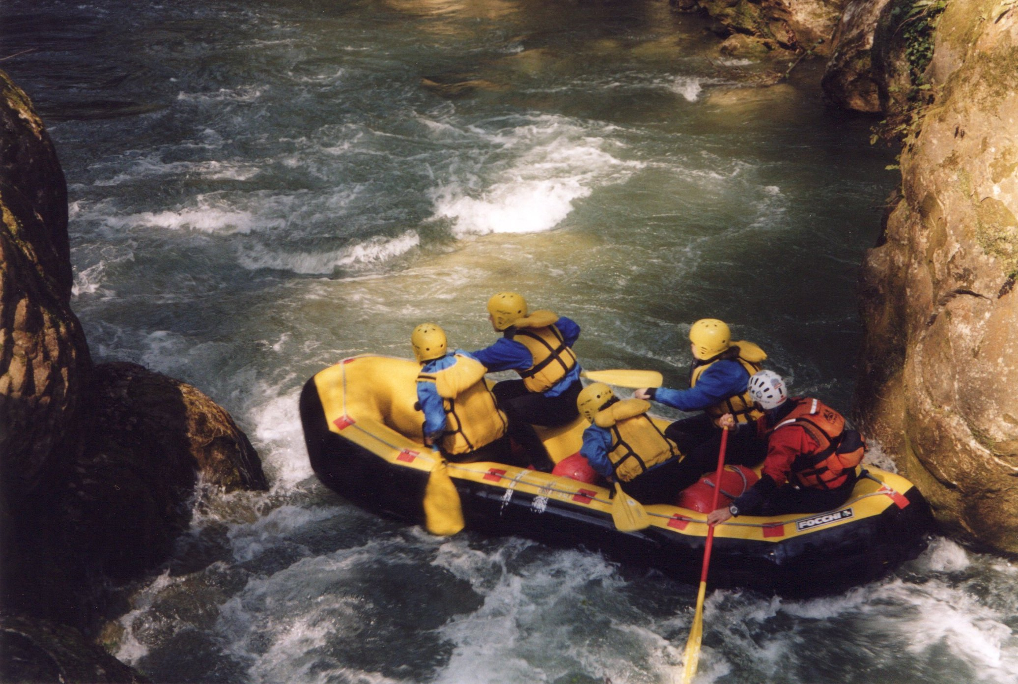 Rafting alle Cascate delle Marmore